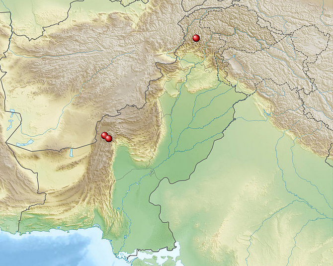 Localización de los atentados del 10 de enero de 2013 en Pakistán